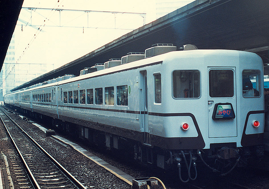 国鉄 14系お座敷 みやび